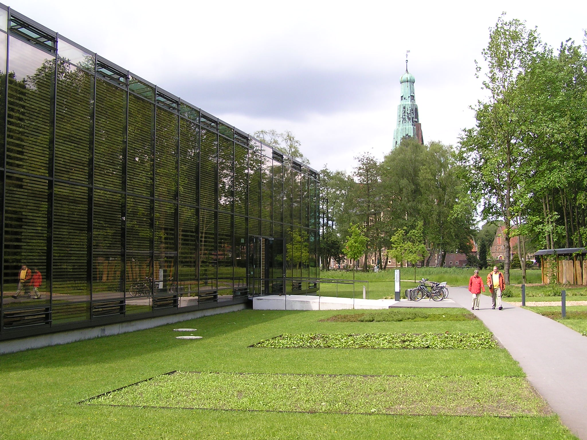 Besucher- und Informationszentrum Tiergarten Schloss Raesfeld